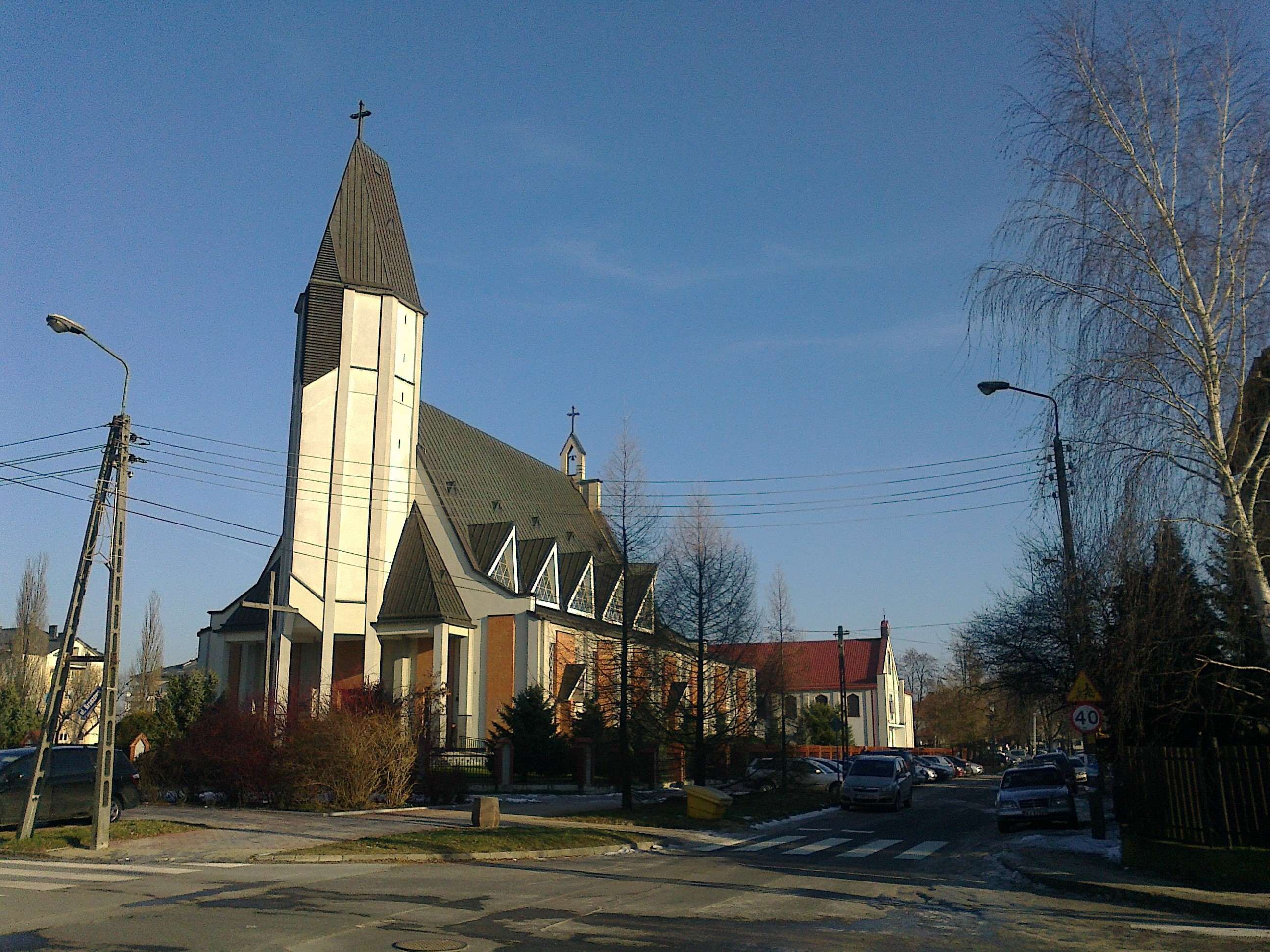 Kościół Matki Bożej Królowej Polski w Wołominie